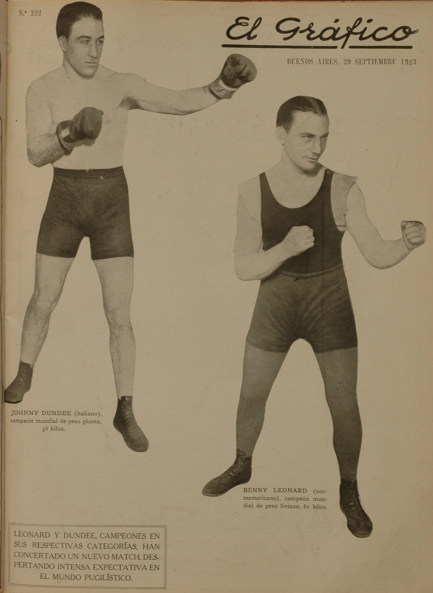 El Grafico del 29 de Septiembre de 1923. Edicion 222